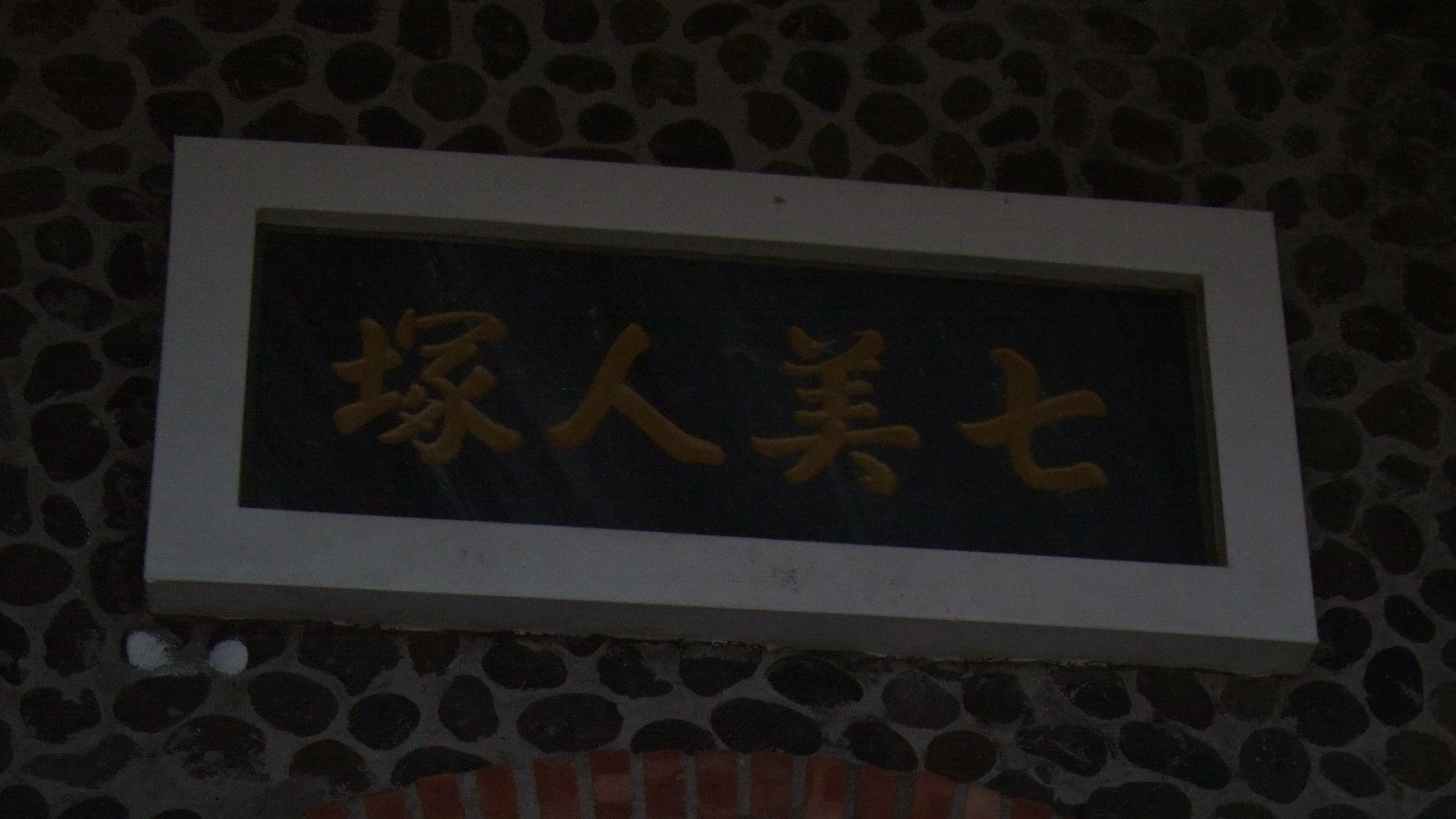 臺灣澎湖縣七美鄉七美人塚入口上方匾額。